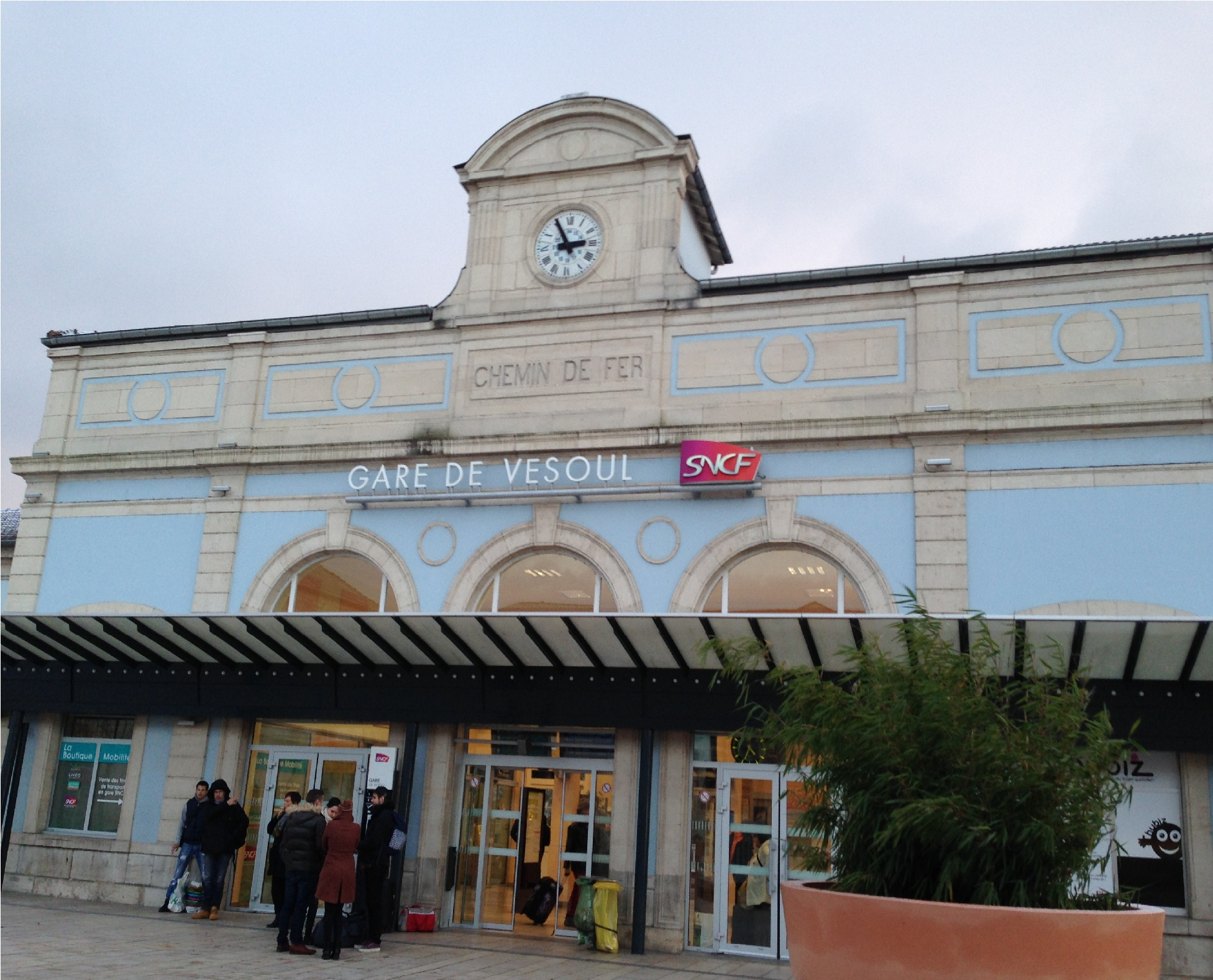 Gare de Vesoul